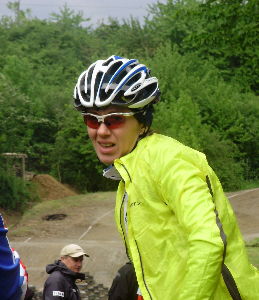 Lada Kozlíková in Vyškov, Czech Republic.